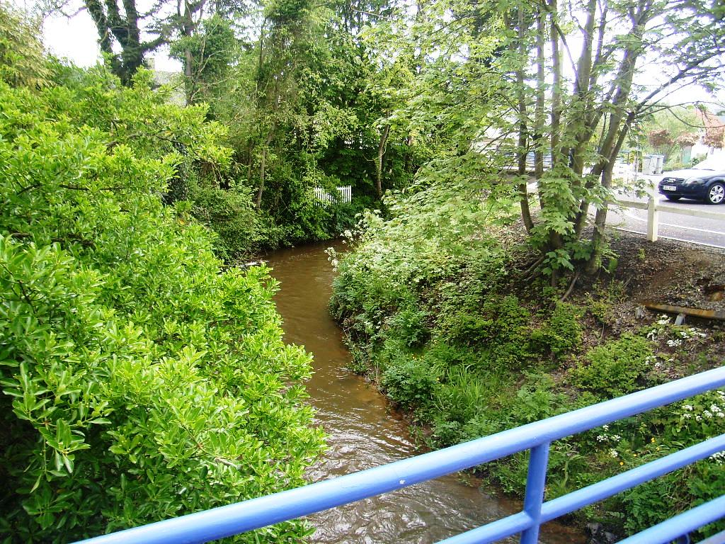 Rivière Le Thar à Jullouville (50) à proximité du Pont Bleu